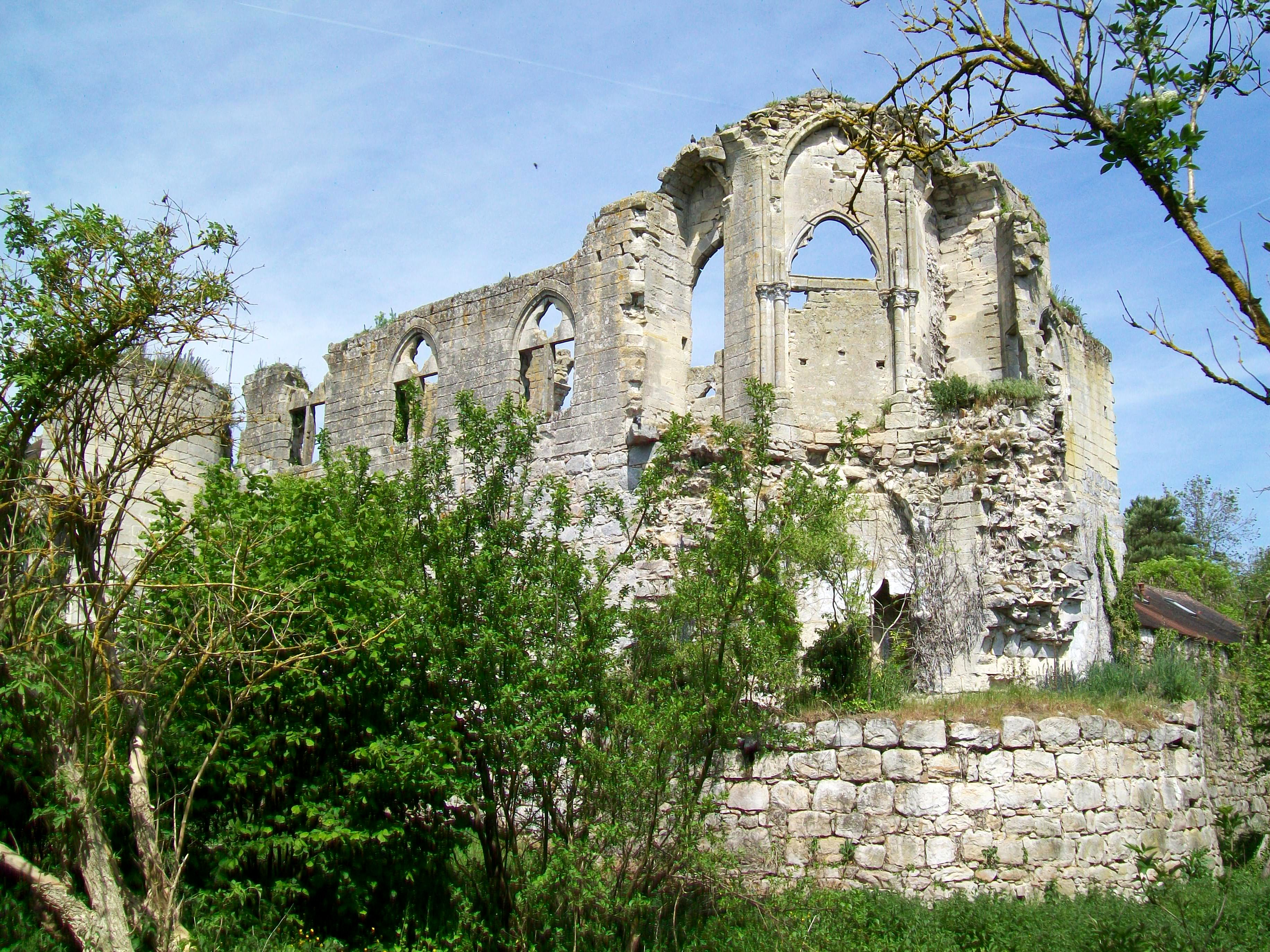 La chapelle de l'ancien château, au premier étage ; vue depuis le sud-est.